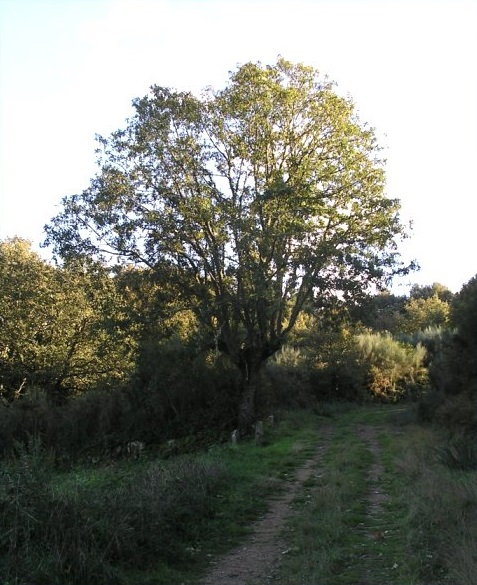 Carballo á beira do camiño no Lugar de importancia comunitaria da Marronda, en Baleira